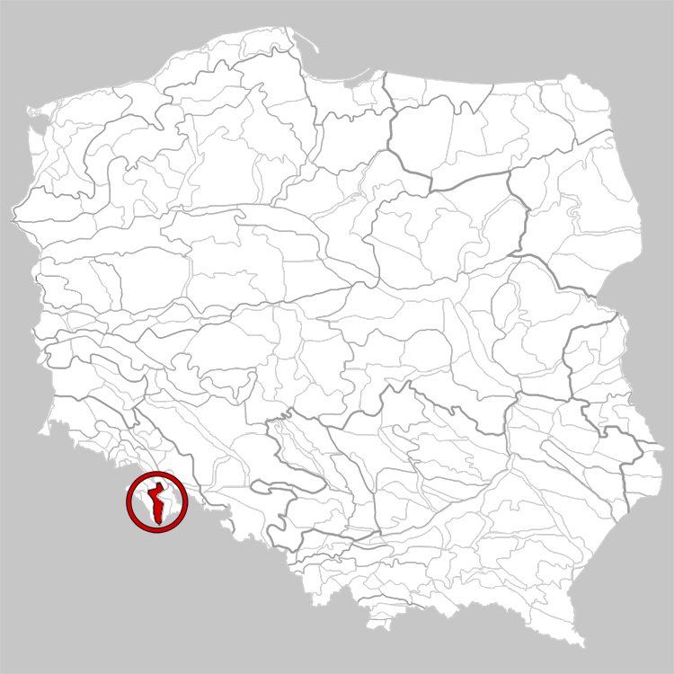 Physico-geographical regionalization of Poland Mezoregion 332.54 Kłodzko Basin Regionalizacja fizycznogeograficzna Polski Mezoregion 332.54 Kotlina Kłodzka